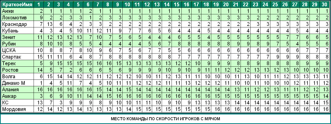 Распределение места команды по скорости игроков с мячом в ходе ЧР Премьер-лиги 2012/2013 года (CraftSoft)